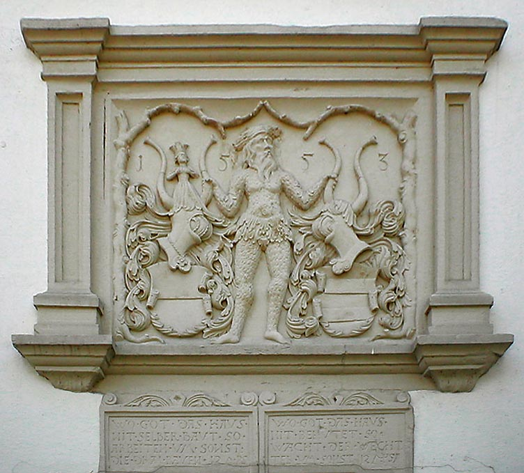 Wappenstein über dem Hauptportal von Schloss Lehen in Kochendorf, datiert 1553